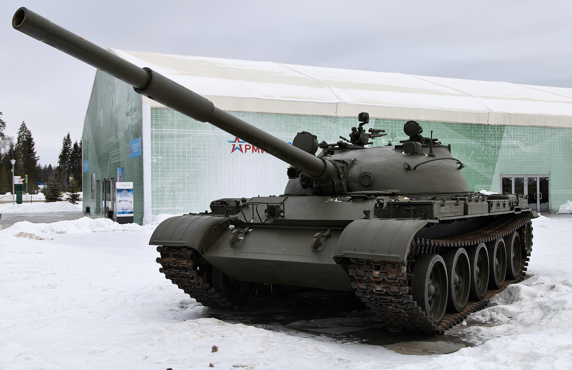 Т-62 образца 1972 года.